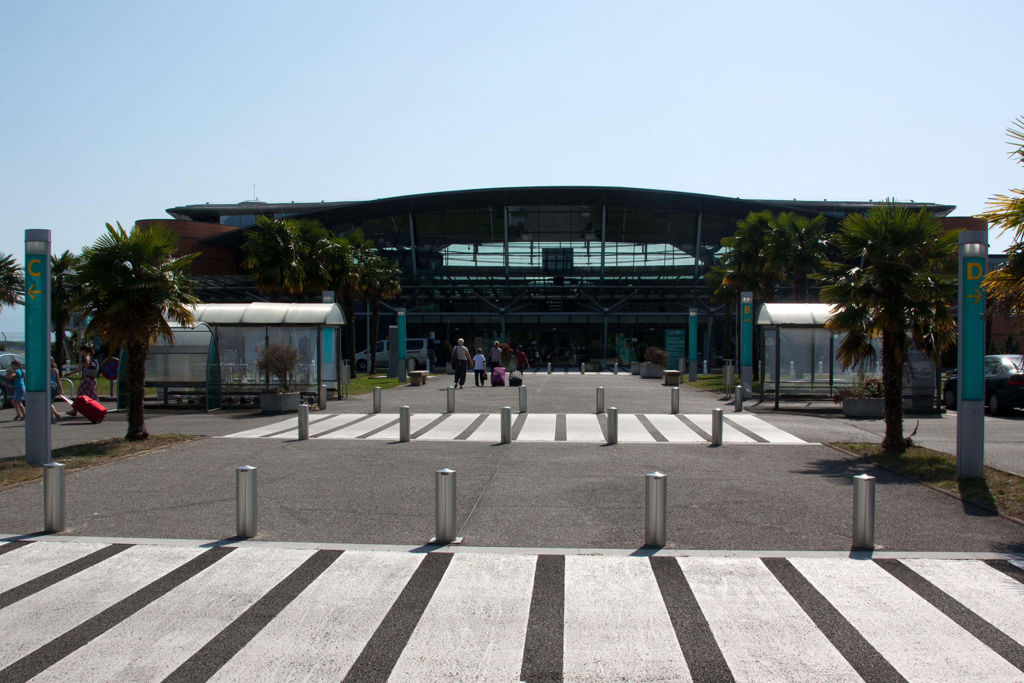 Aéroport de Pau-Pyrénées, Pyrénées-Atlantiques, France / Vue de l'aérogare depuis la voirie